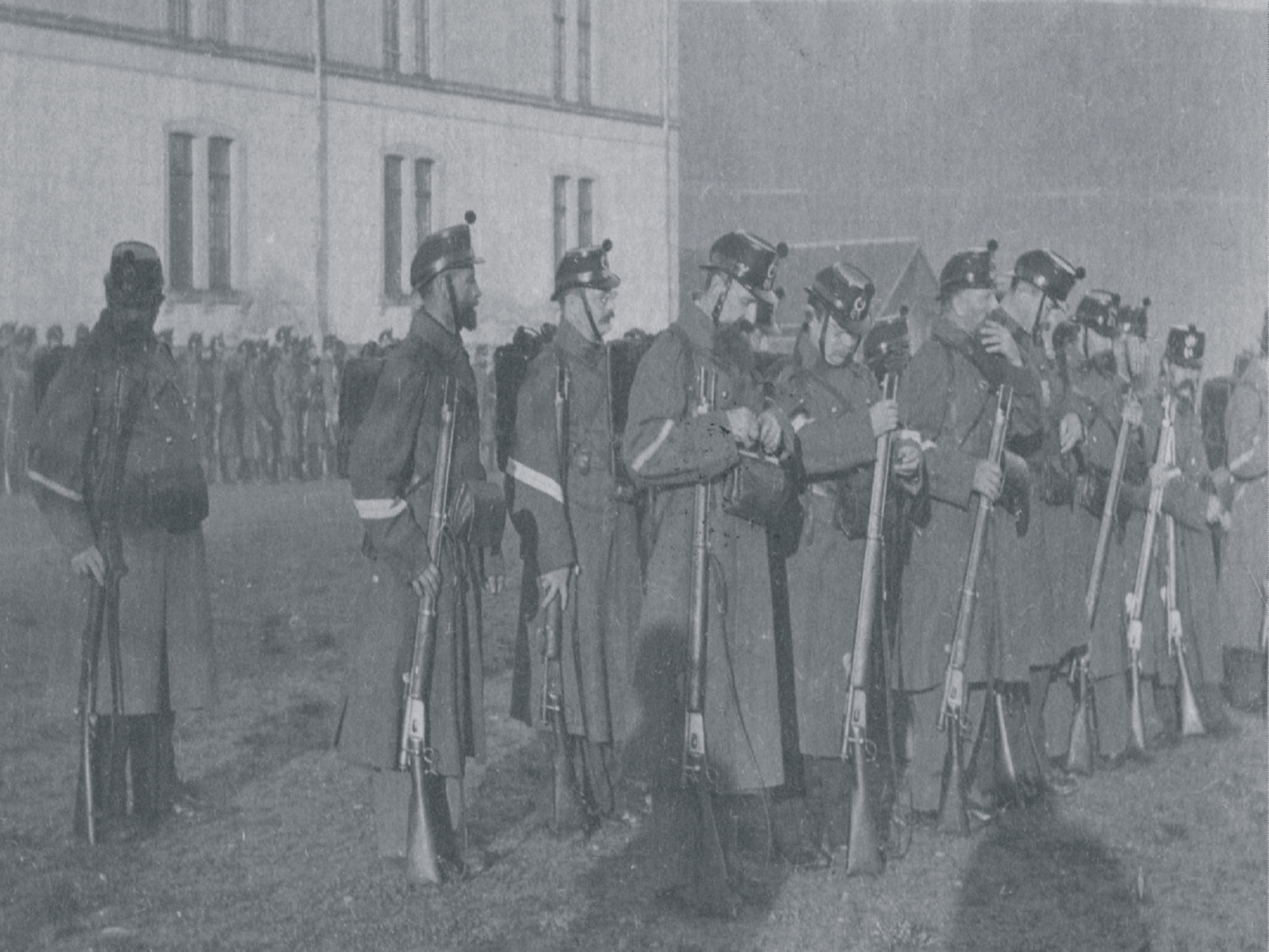 Groupe de fantassins du Landsturm, caserne d'Herisau novembre 1898